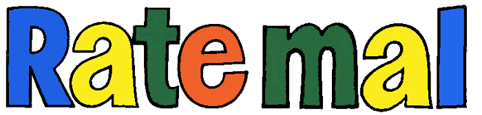 Logo der ehemaligen Kinderzeitschrift Rate mal